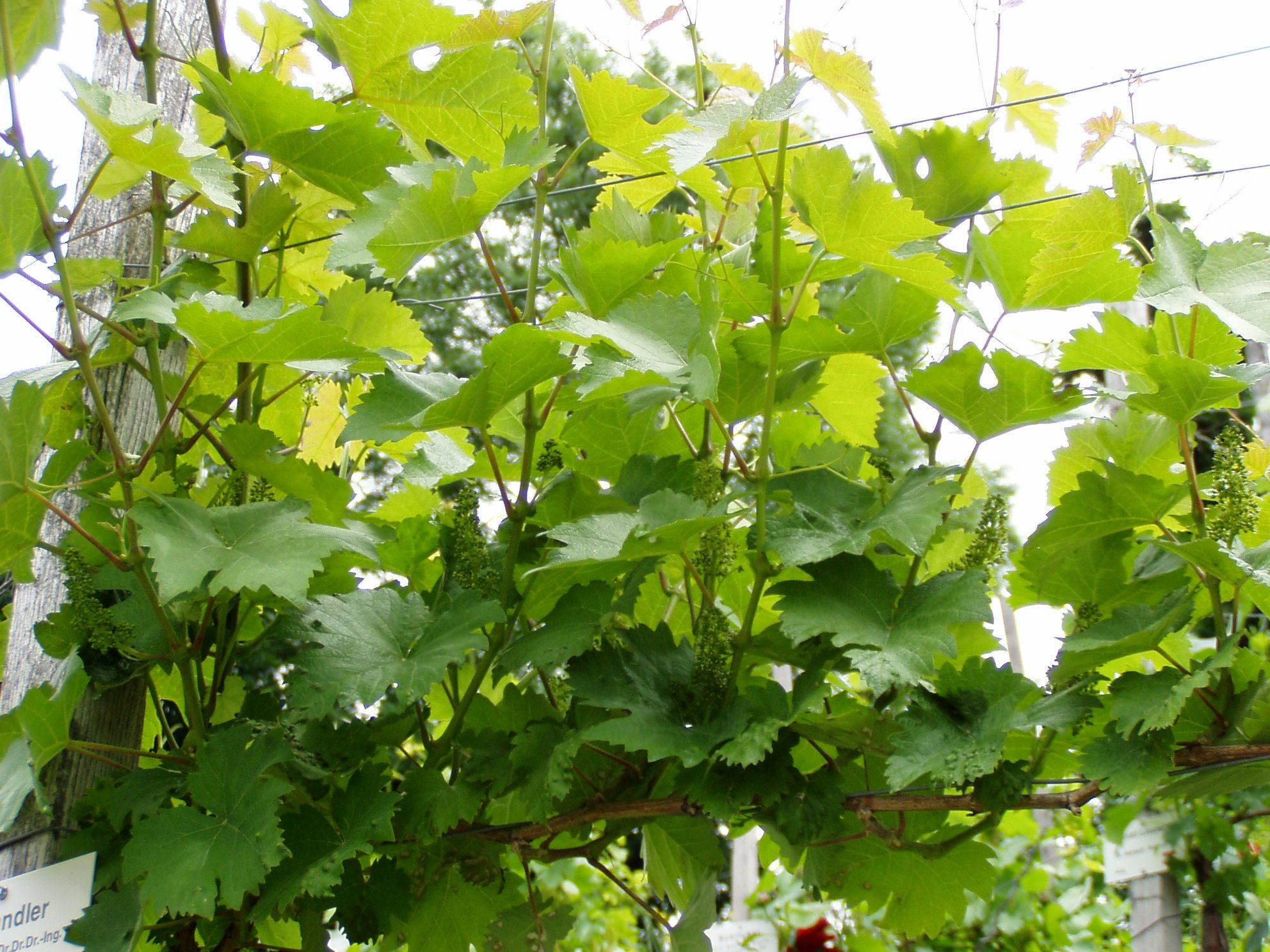 Zierfandler, cultivar of Vitis vinifera, Kitzeck im Sausal, Styria, Austria